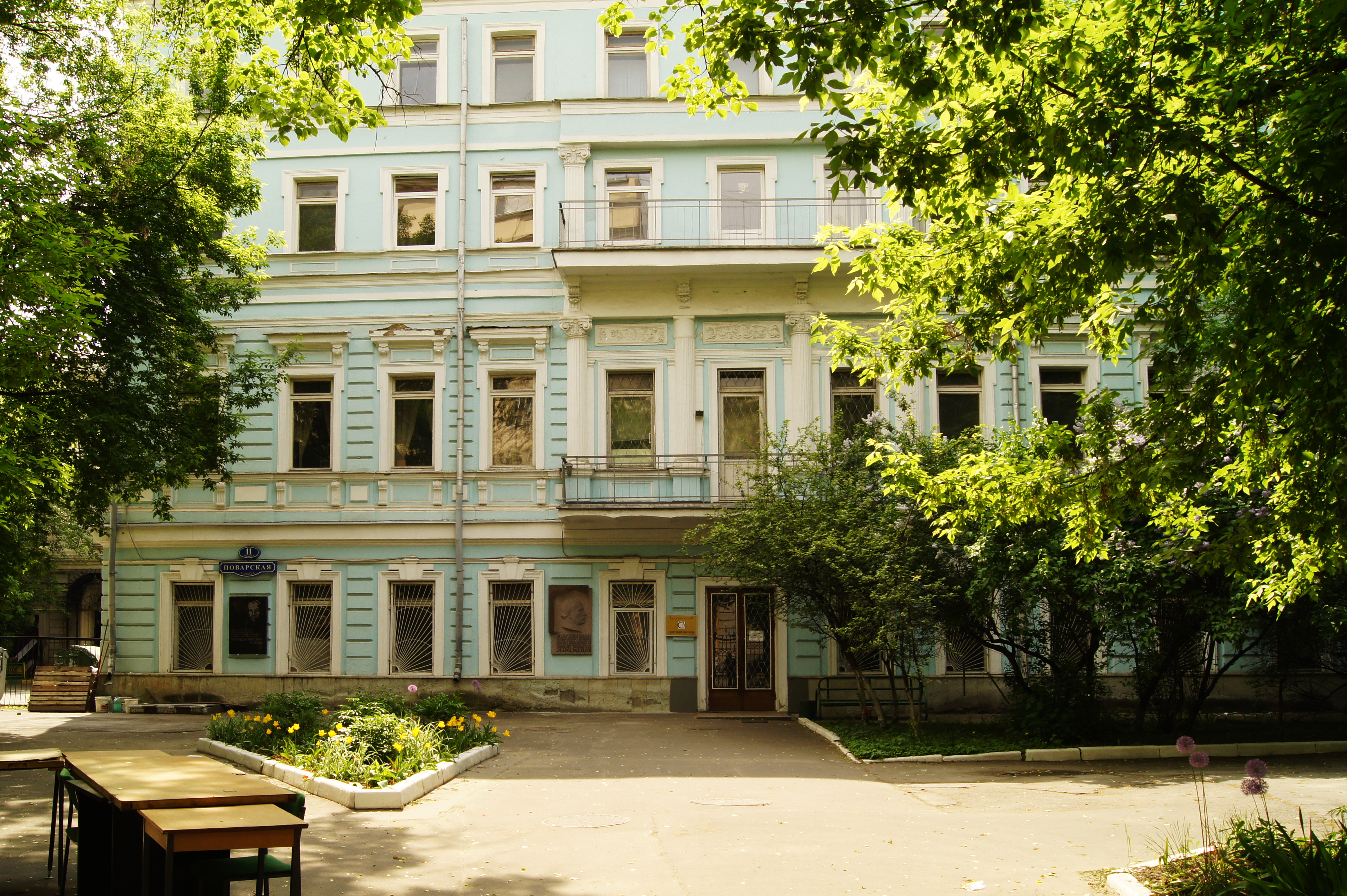 Povarskaya Street Moscow,11